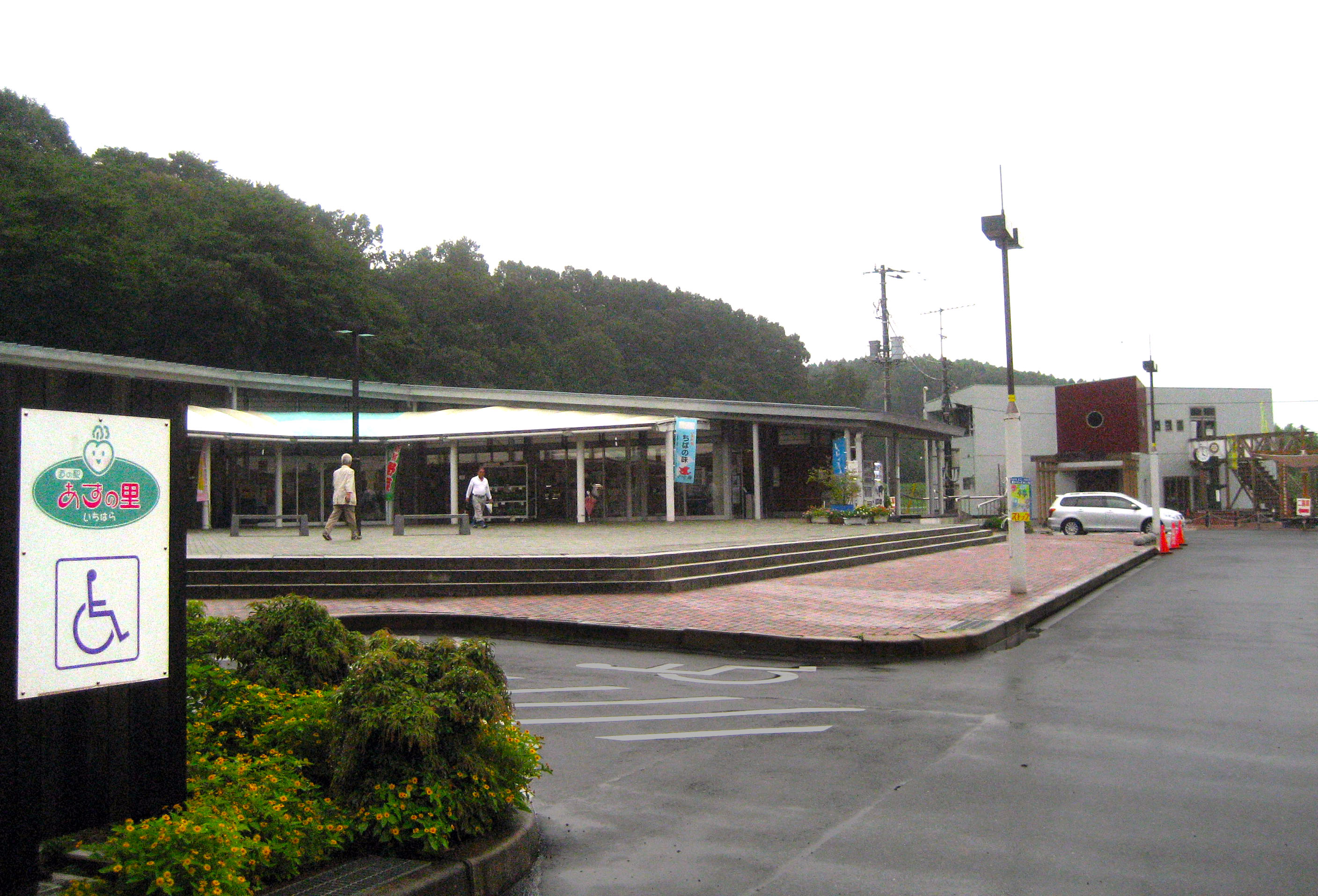 道の駅あずの里市原（千葉県市原市）